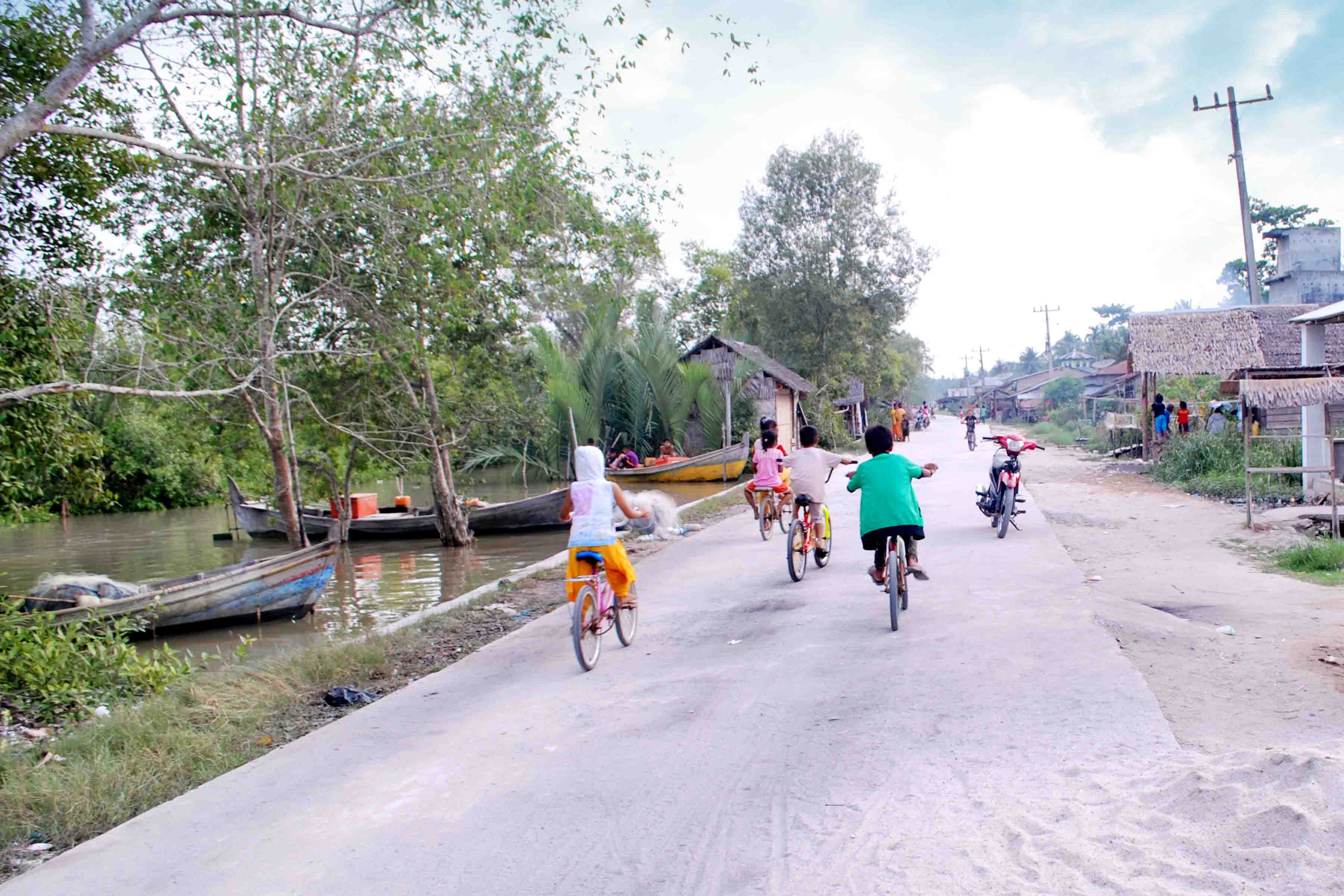 Kampung halaman